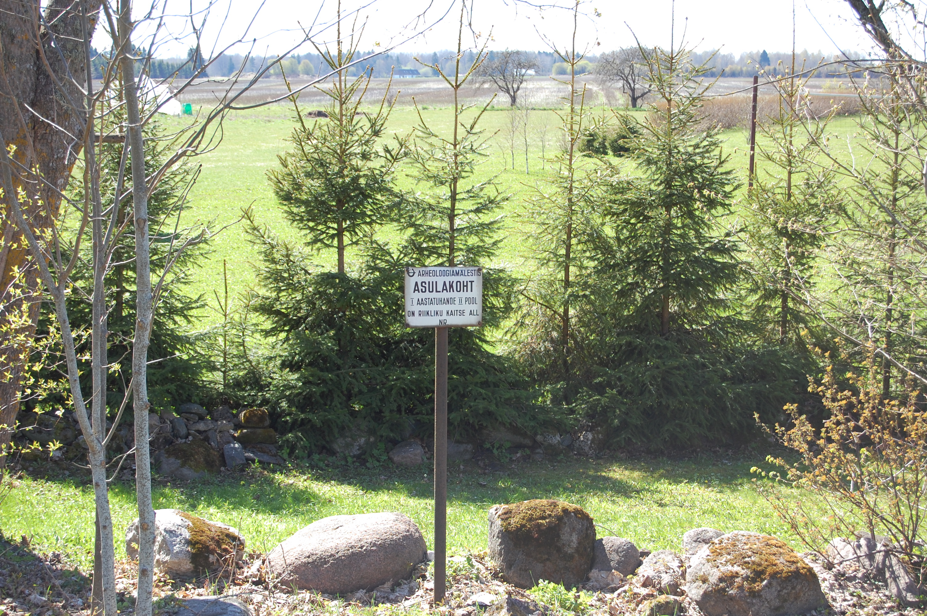 Asulakoht. Kirimäe küla, Taebla vald.